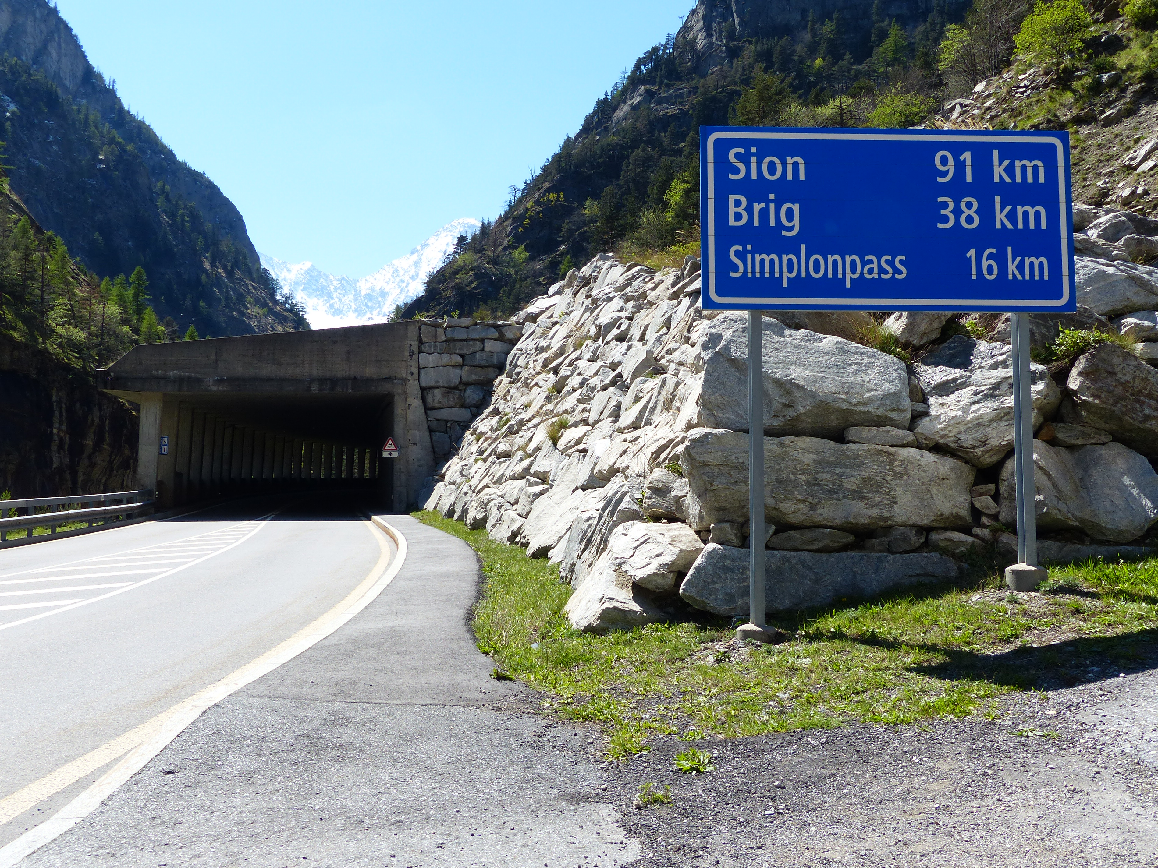 Panneau 4.65 indiquant les distances de Sion, Brig et Simplonpass, route nationale 9S, Valais, Suisse.